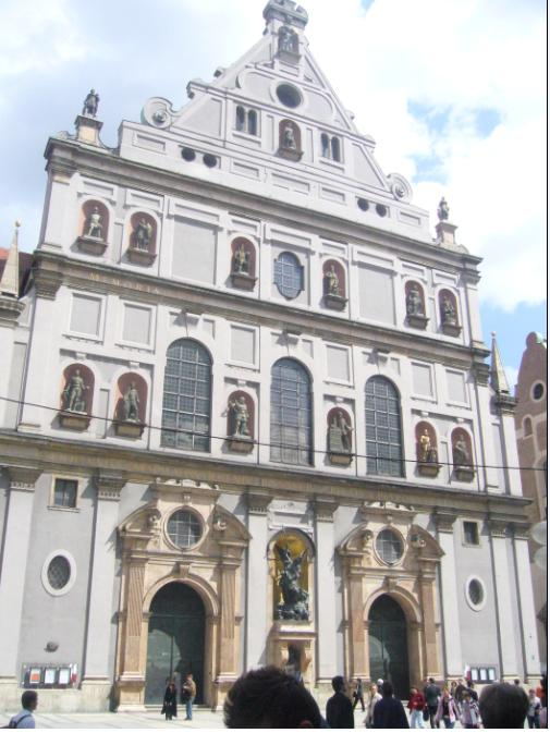 Photographie personnelle.